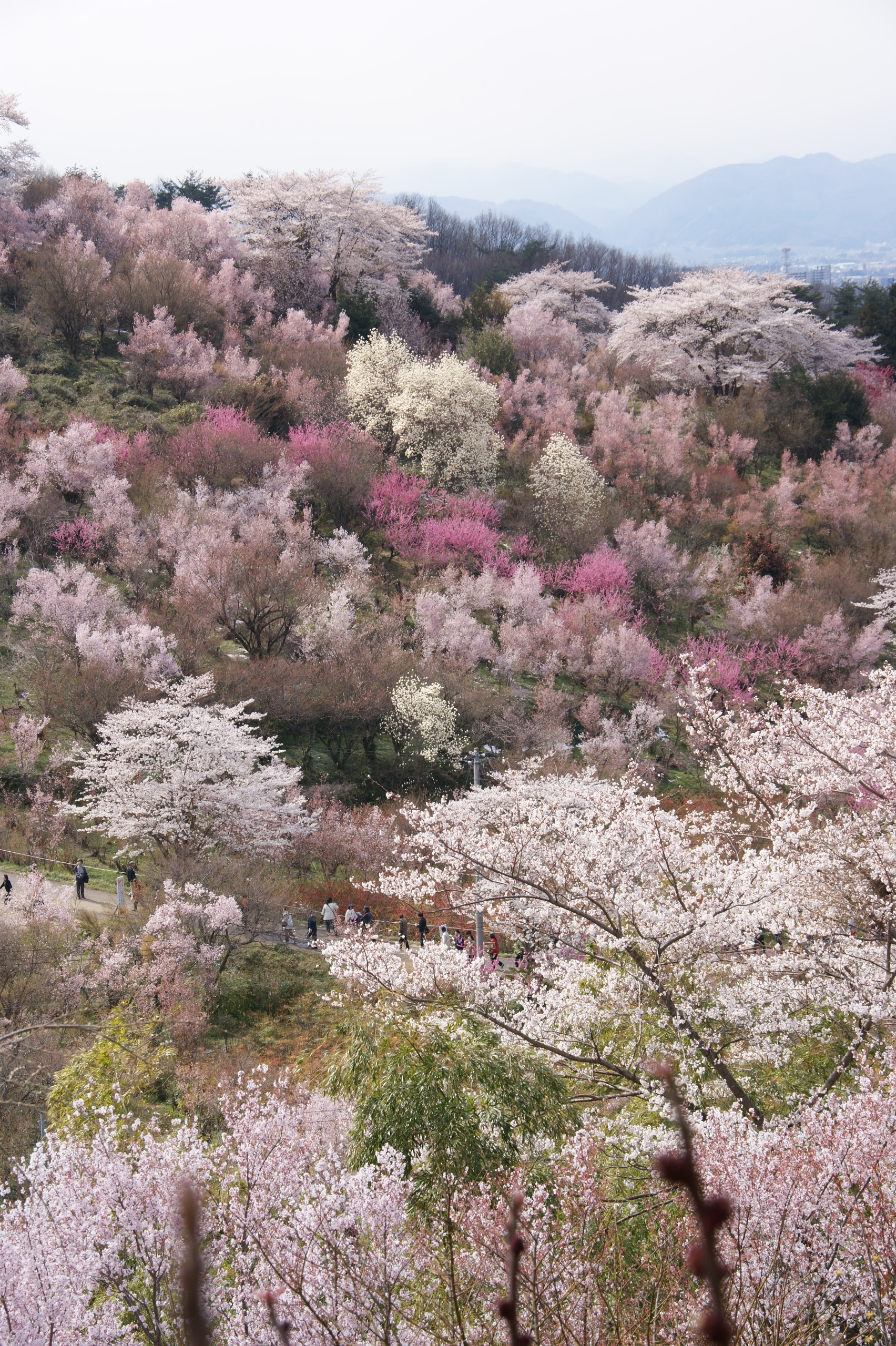 花見山公園。桃、ハクレン、レンギョウ、サクラなどの花が咲き誇る。奥は福島盆地。